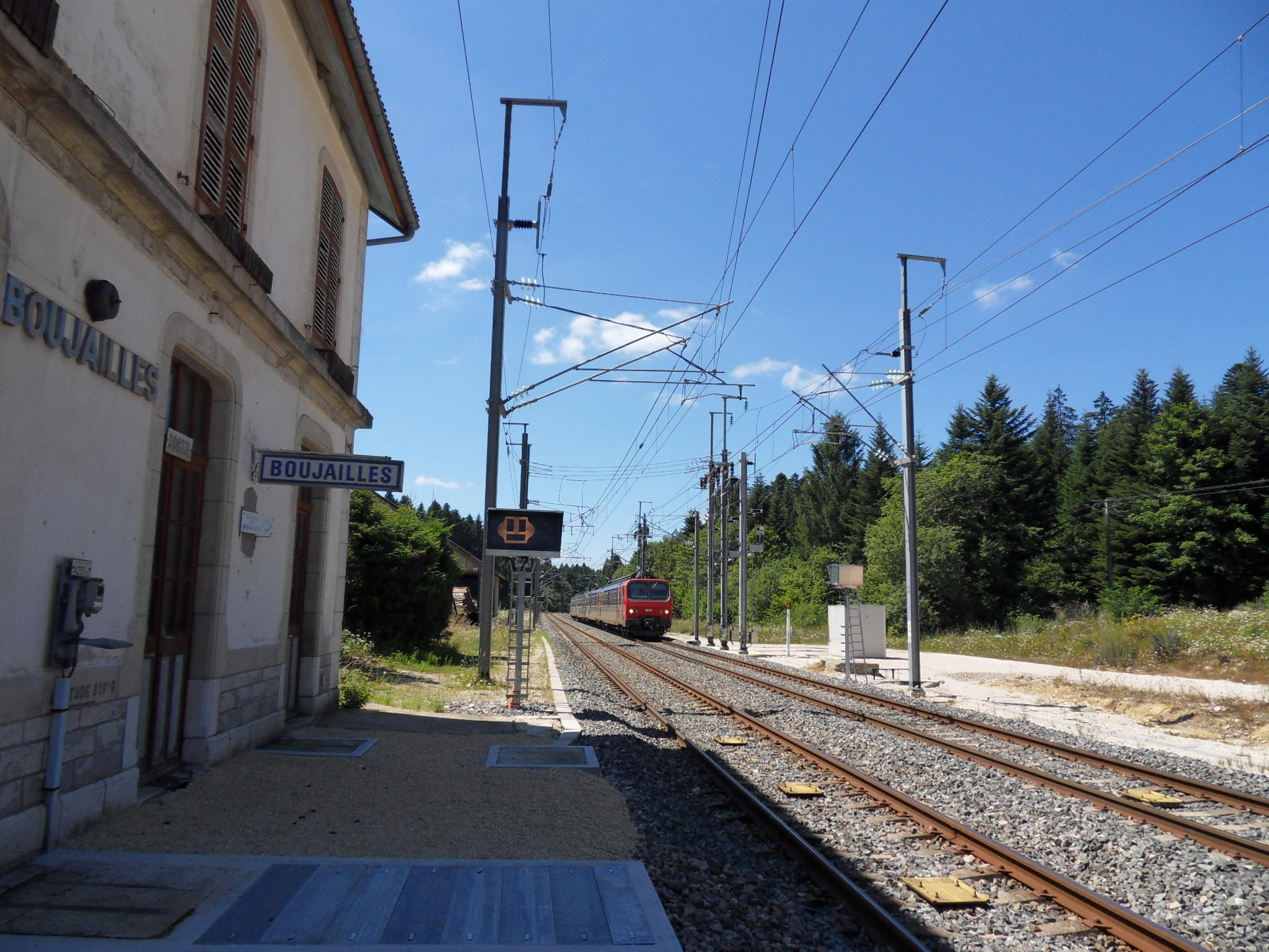 Boujailles (Doubs) (department). Ligne de Dole à Vallorbe. Ligne Dijon-Ville - Vallorbe (frontière) : Une section à double-voie. Une circulation Z2 à destination de Frasne arrive en gare. Sur voie 2, une signal lumineux « Coupez-courant » est présenté.